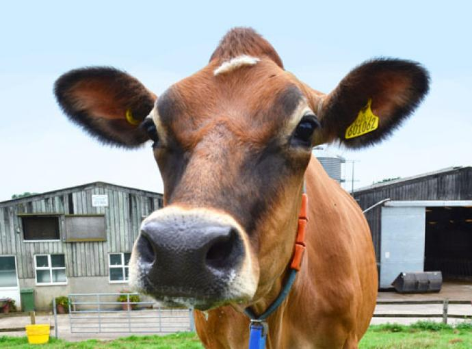 Srneća gubica kod Džerzej rase